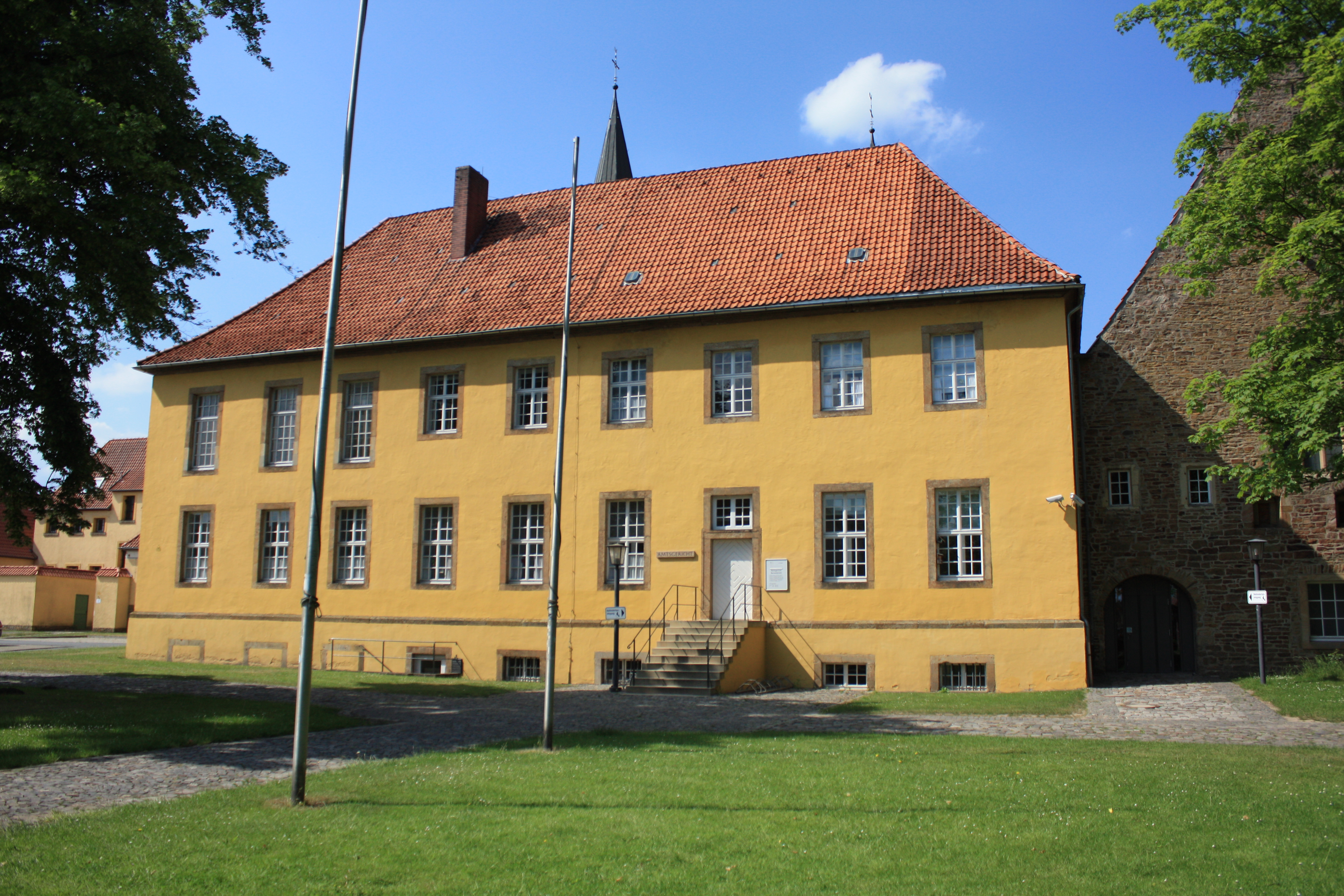 Kloster Bersenbrück; heute Amtsgericht